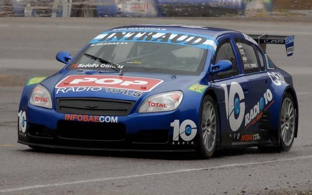 Chevrolet Vectra III de Top Race. Piloto: Nicolás Iglesias